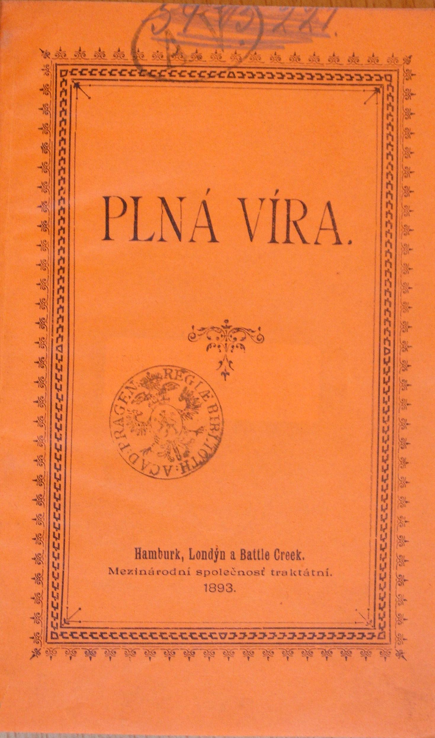 Adventistický spis Plná víra